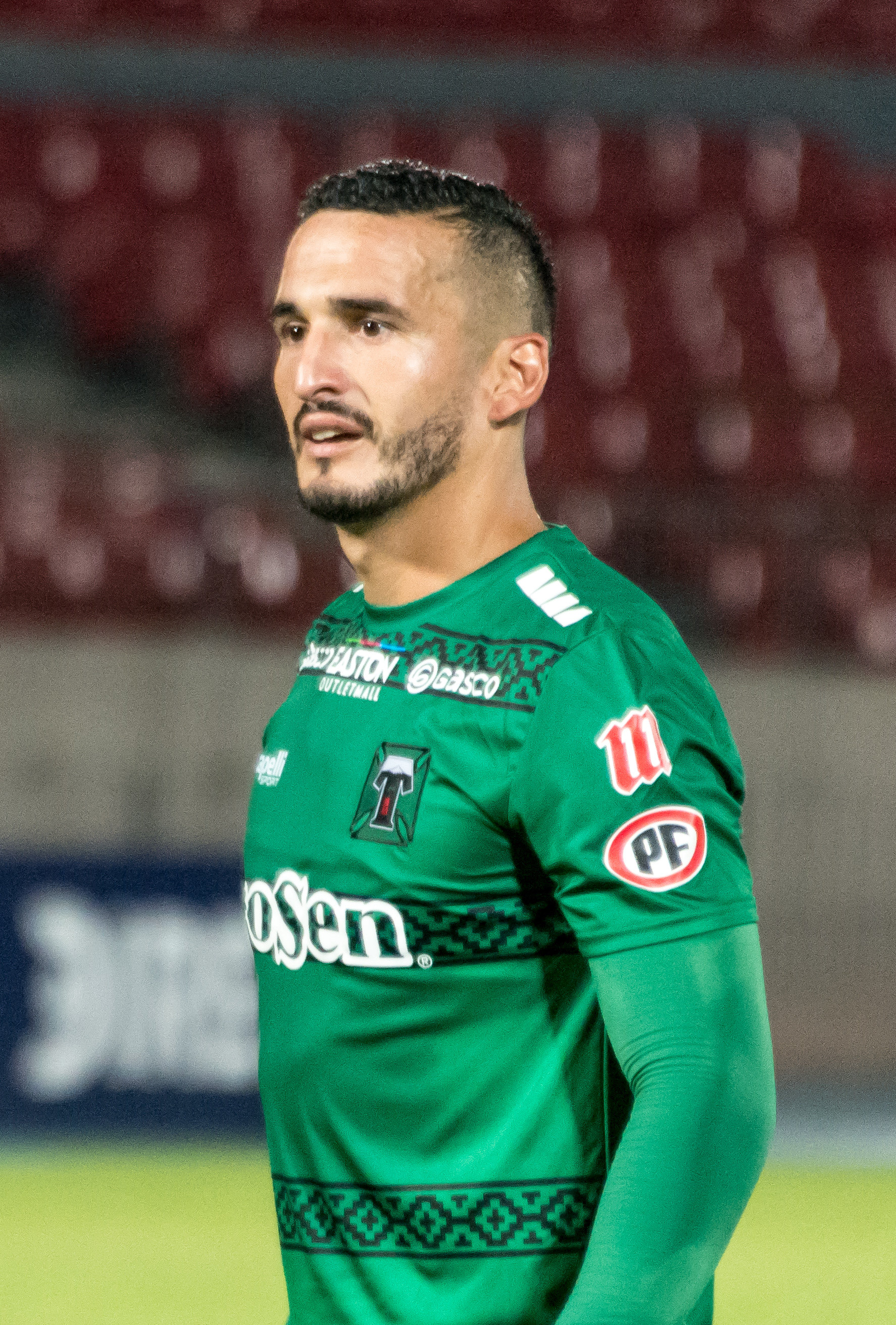 Deportes La Serena v Deportes Temuco, Estadio Nacional de Chile, Ñuñoa, Santiago, Región Metropolitana, Chile